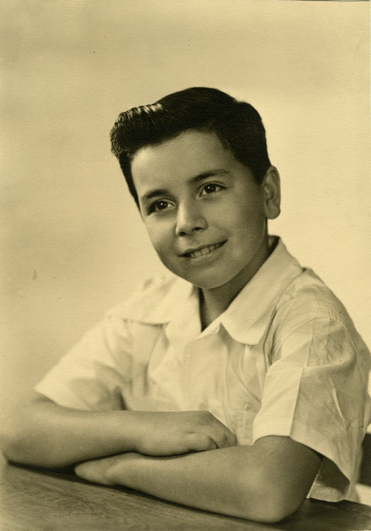 Juan Salvador Guzmán Tapia, hijo de Juan Guzman Cruchaga. Manuscrito con tinta verde por el reverso: "Washington D.C. 1948".